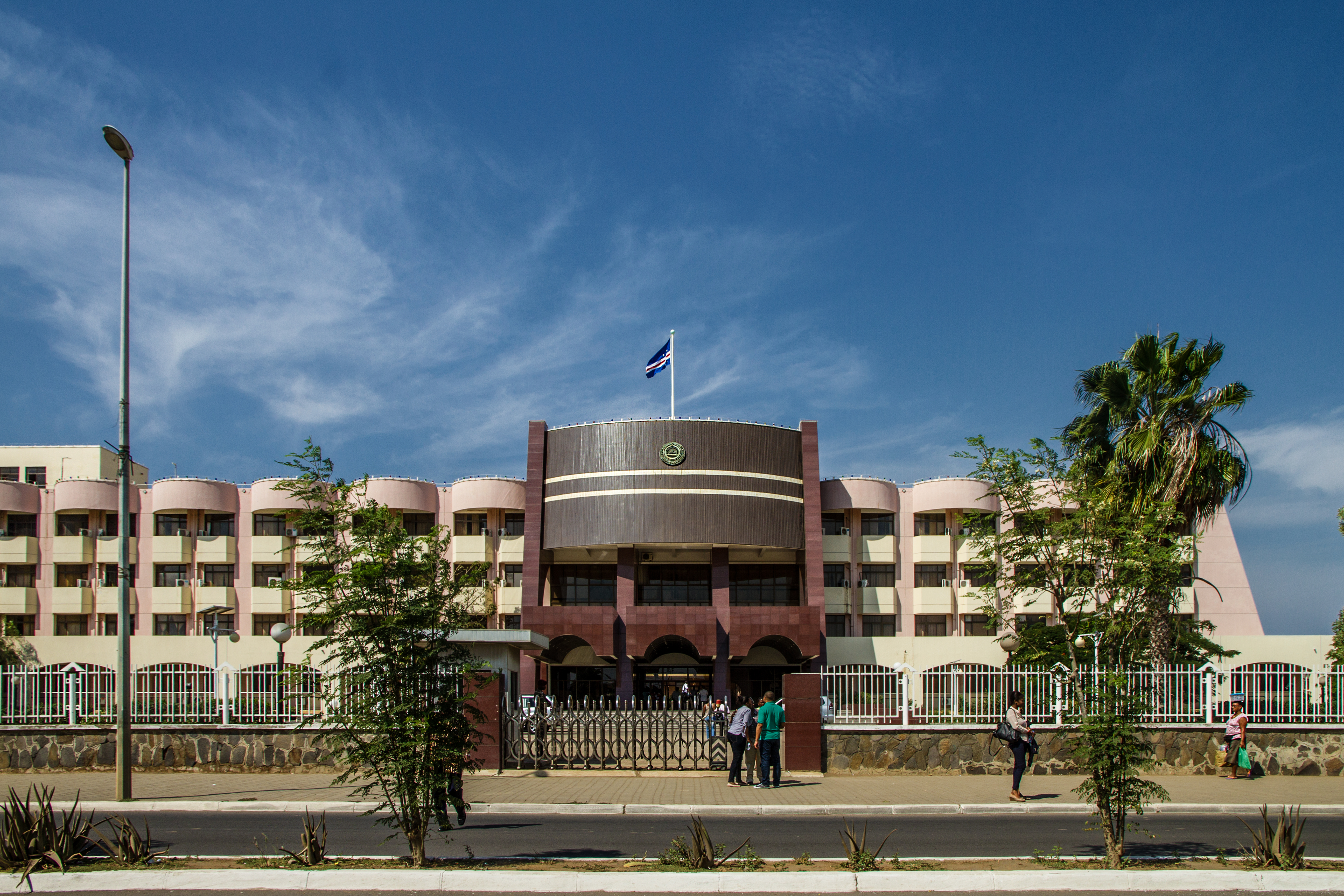 palácio do governo